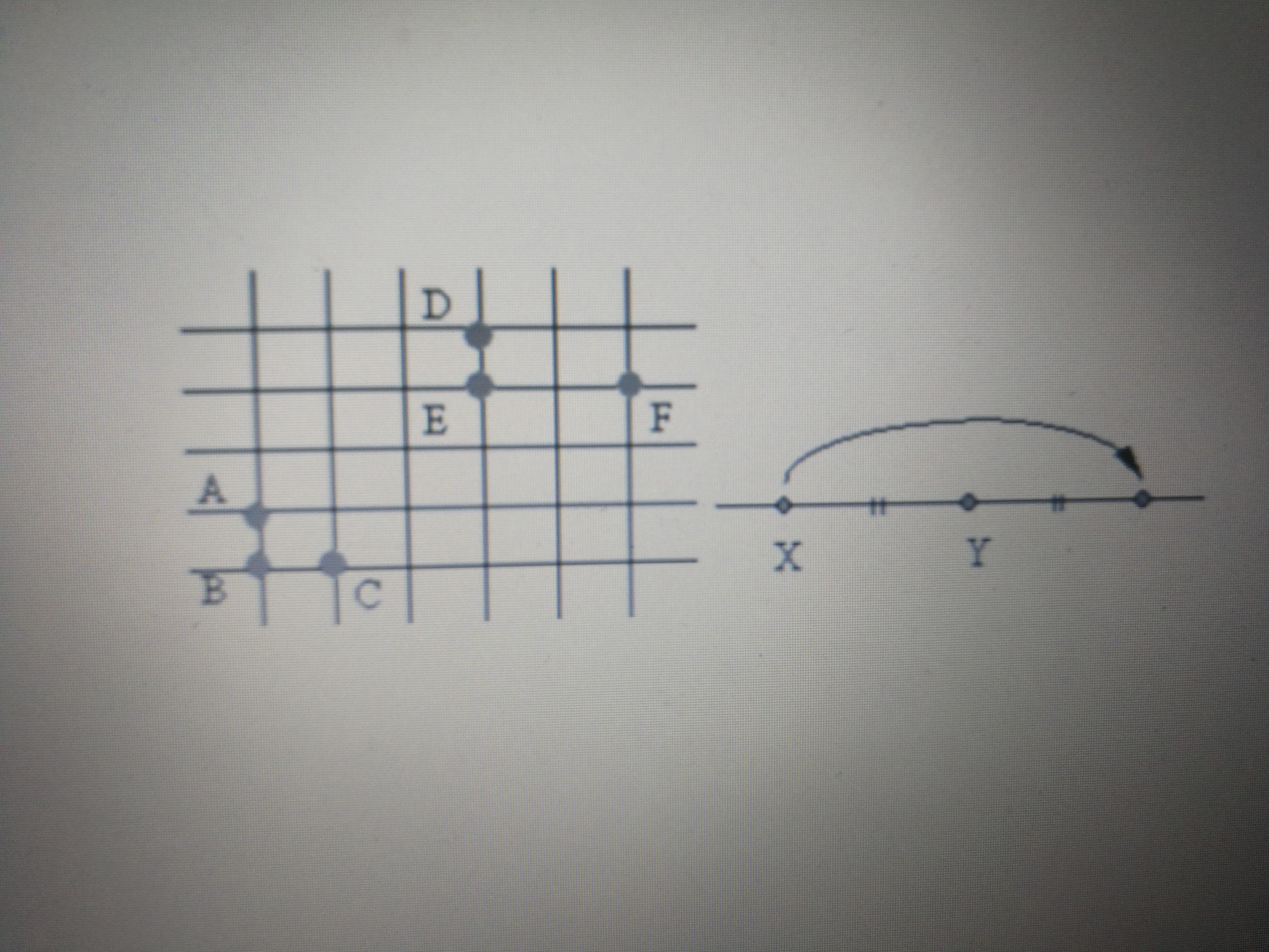 ģeometriskie invarianti